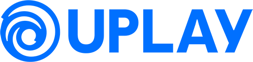 Logo de Uplay depuis Juin 2018